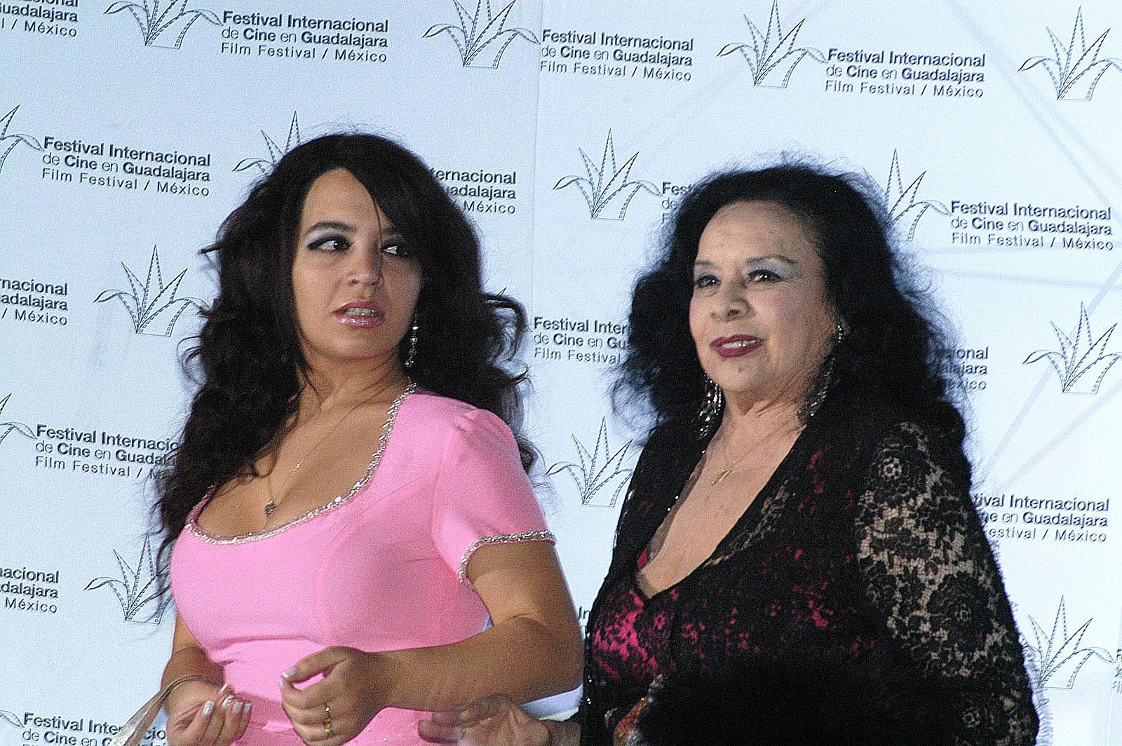 Guadalajara, Jalisco, 7 de marzo de 2008. Isabel Sarli, la musa latinoamericana del cine erótico de los años sesenta y setenta acompañada de su hija en la alfombra roja de la gala inaugural del Festival Internacional de Cine de Guadalajara.